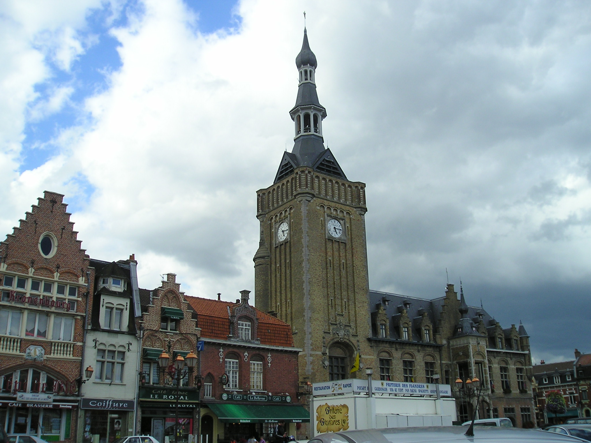 Bailleul